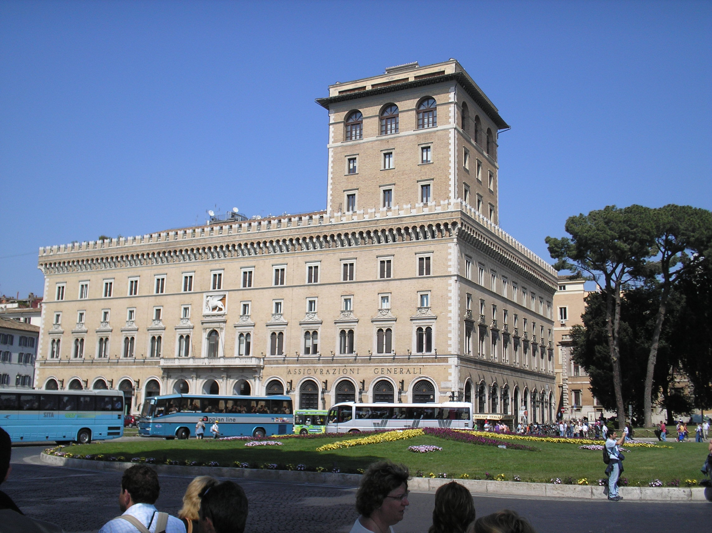 Zelfgemaakte foto